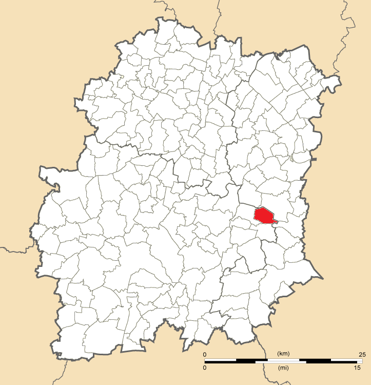 Carte de position de Mondeville en Essonne (91)